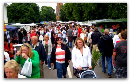 Marknaden i skänninge 2008